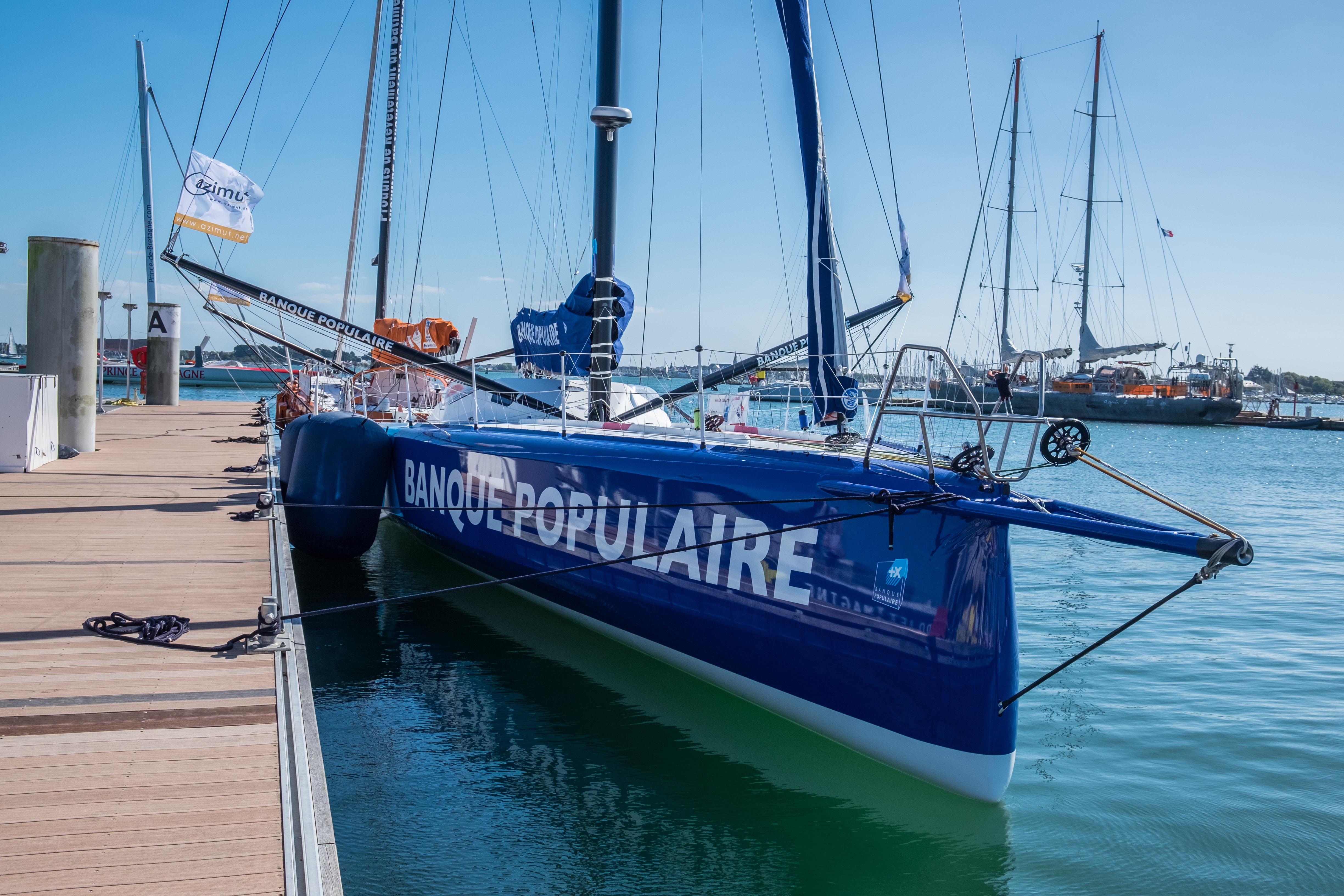 L'étrave du 60 pieds IMOCA Banque populaire VIII, skippé par Armel Le Cléac'h.